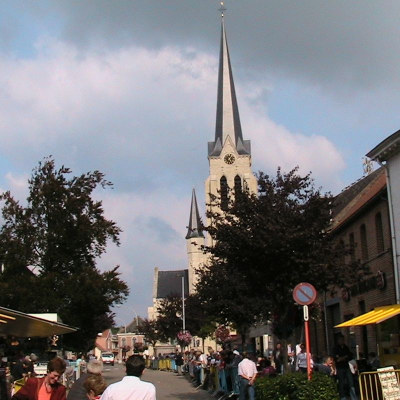 Haasdonk, dum kermeso, la 21-an de aŭgusto 2005. Memfarita foto